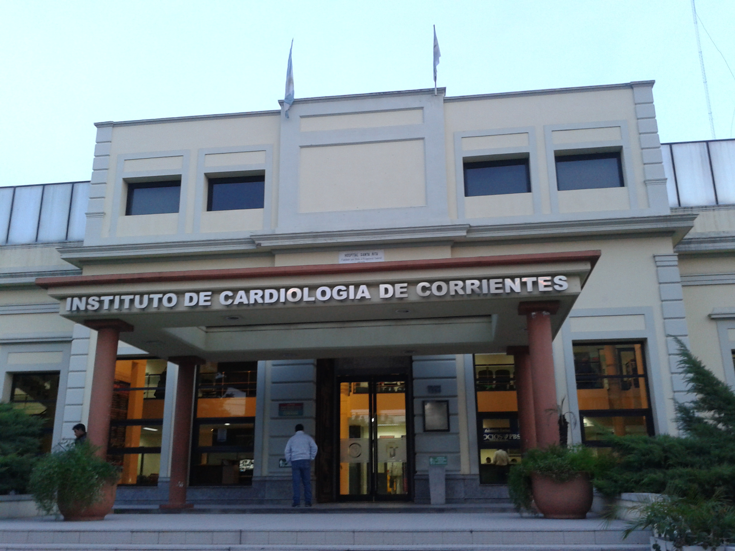 Acceso principal por calle Bolívar 1334.